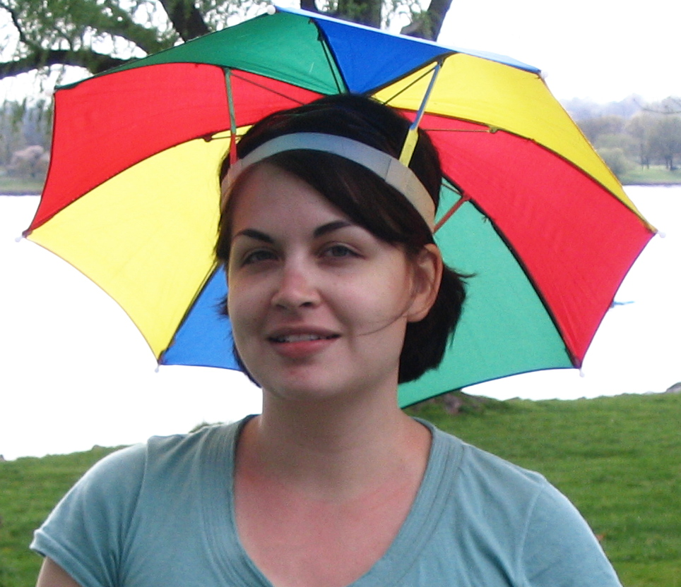 An umbrella hat